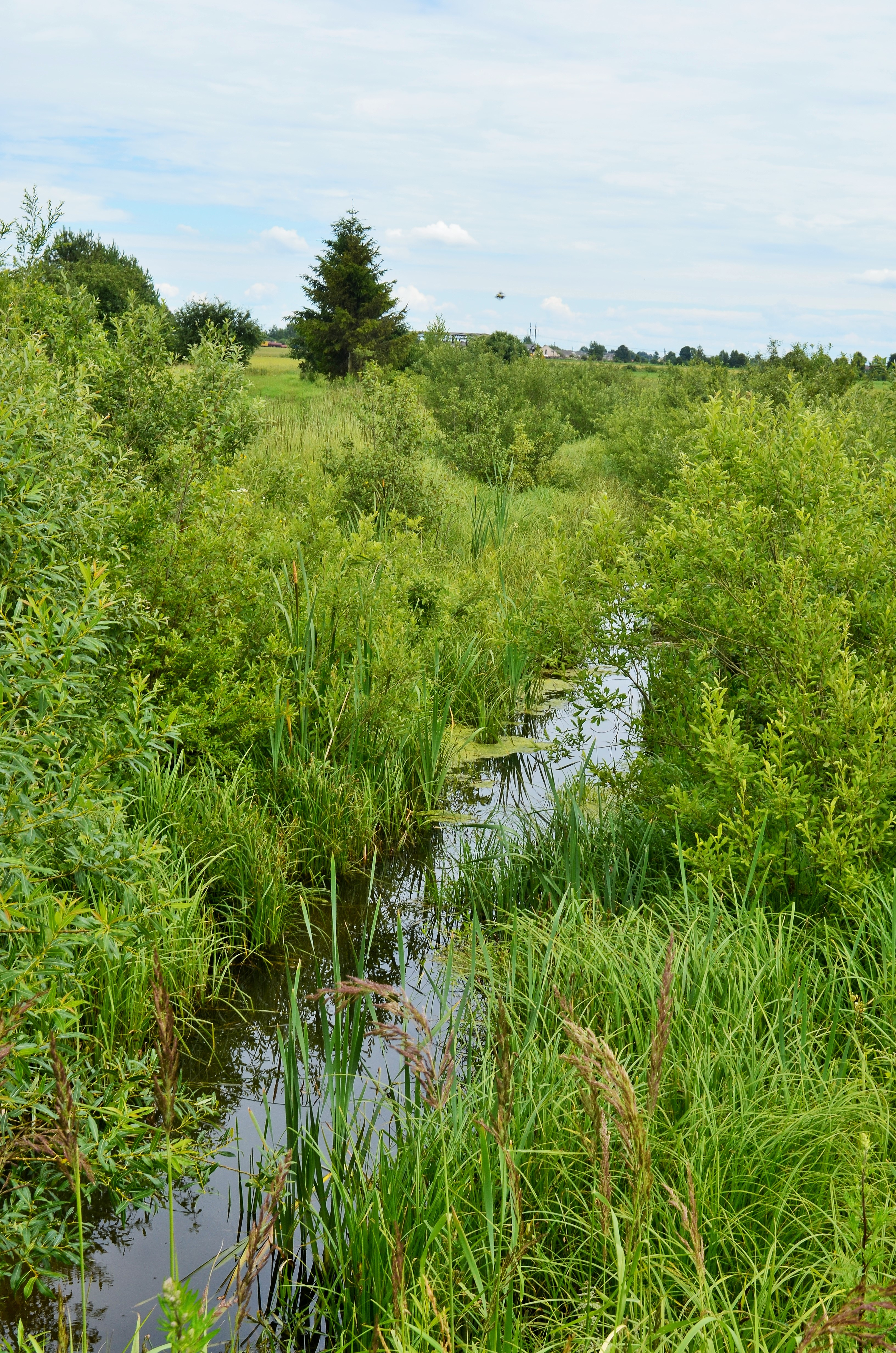 Petraičių upelis (Obels intakas) ties Norbutiškiais, Kėdainių raj.